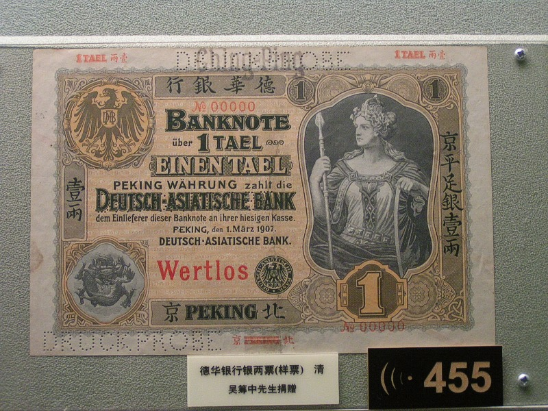 Historische Banknote